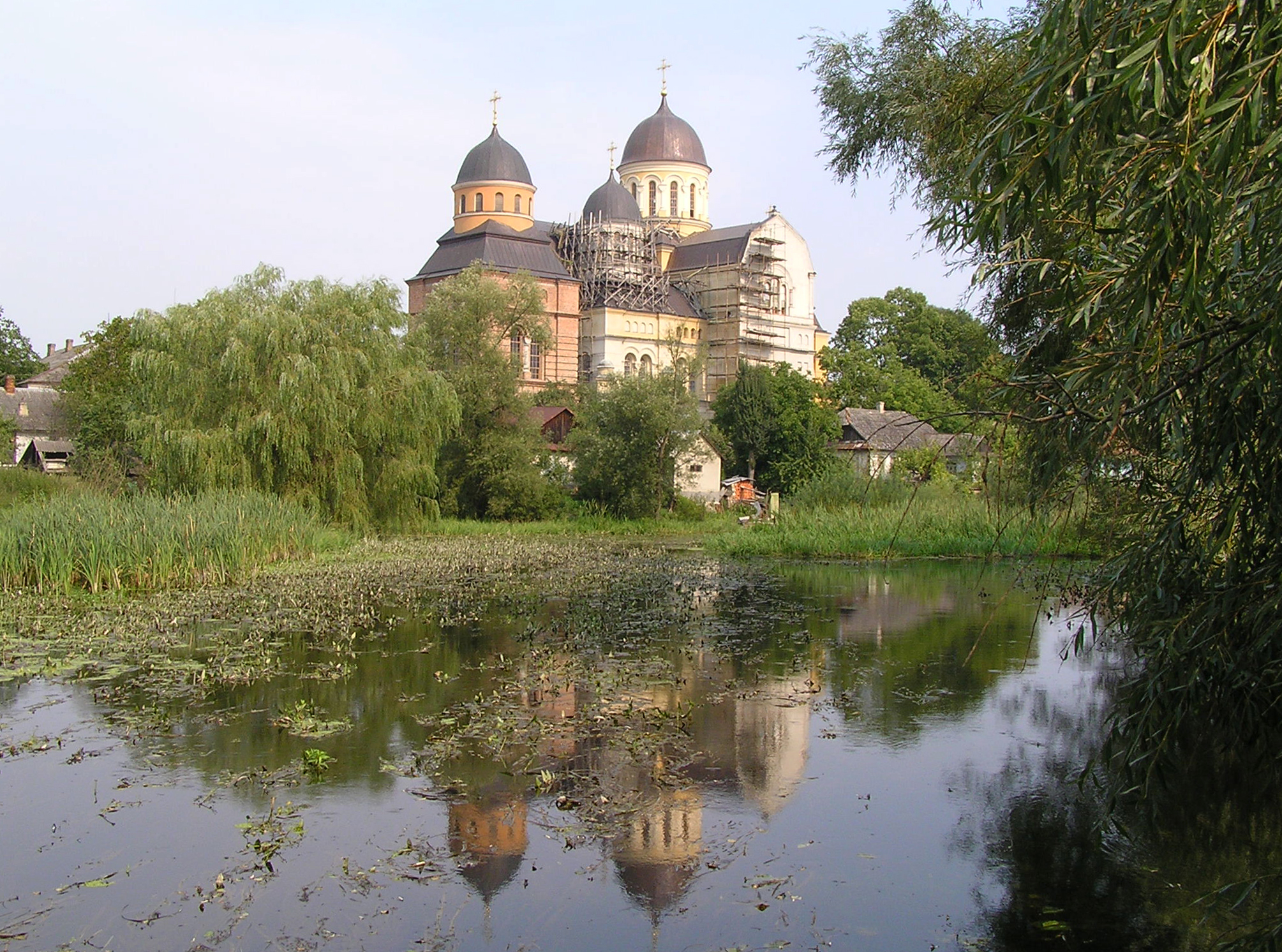 Троїцька церква 1910р. м. Берестечко Горохівського району Волинської області.